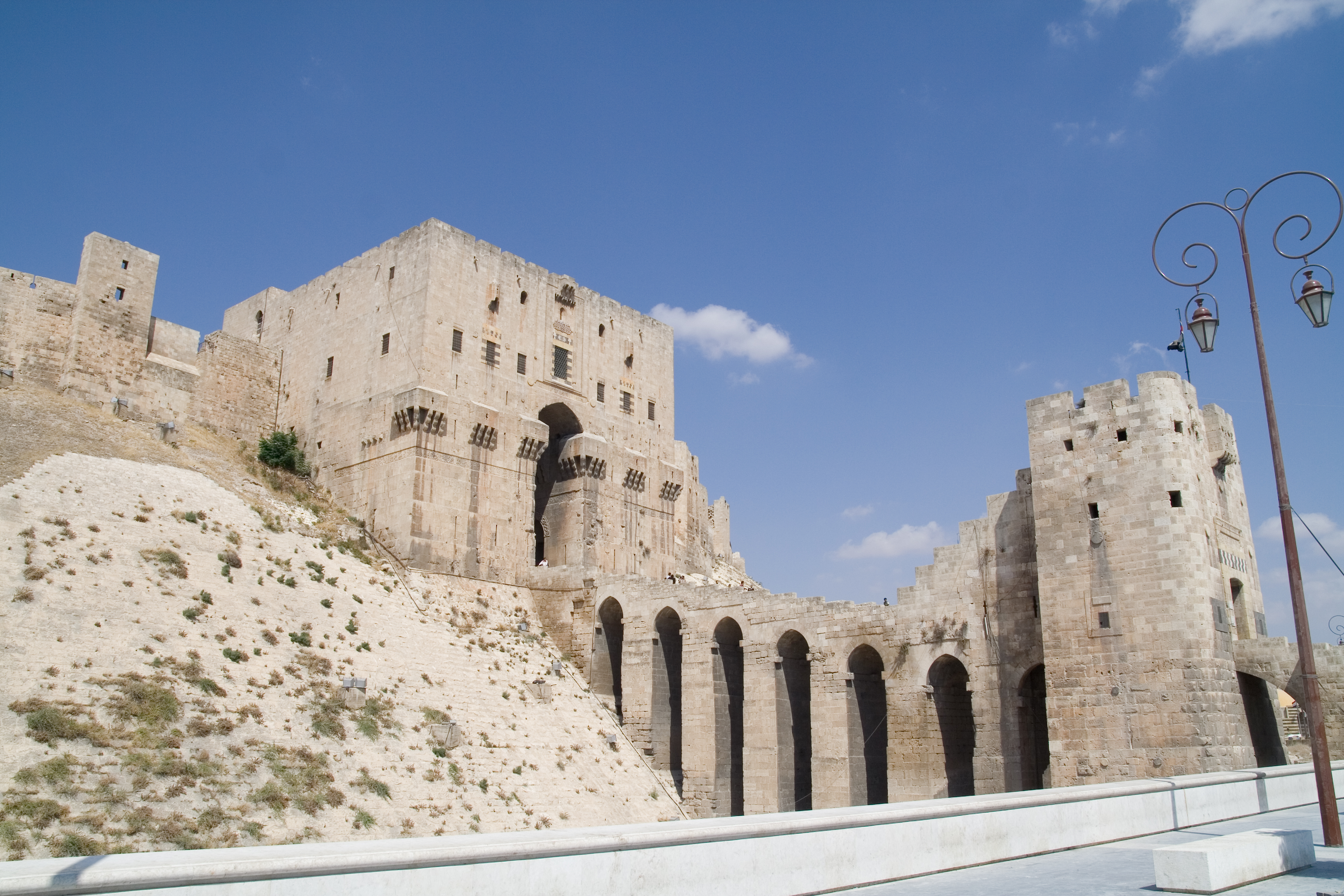 Citadel Aleppo